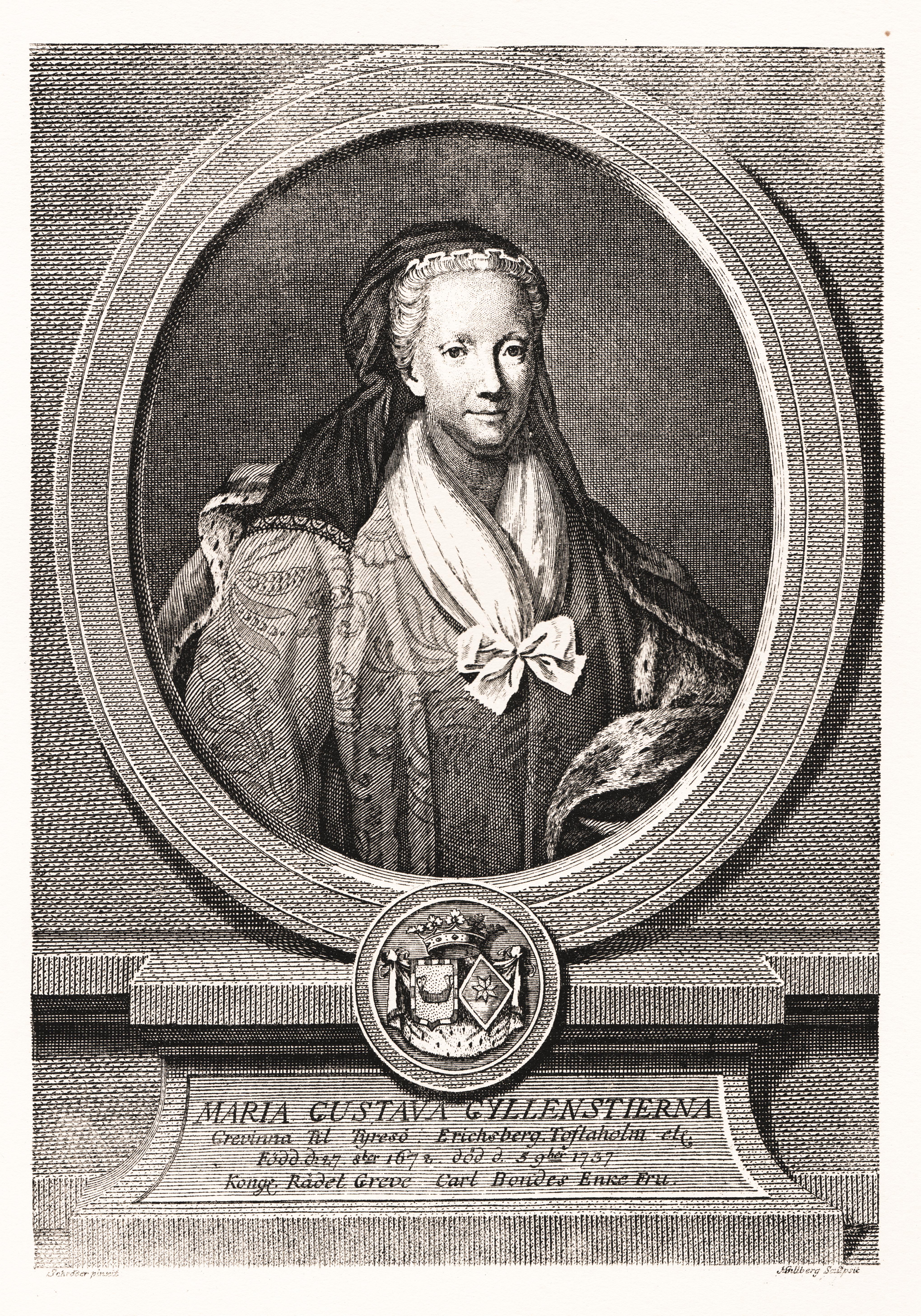 Maria Gustava Gyllenstierna (1672-1737). Originalet till hennes här afbildade graverade porträtt utfördes af Schröder. Gravyren är af J. Gillberg. En del exemplar af denna gravyr företer den olikheten med de öfriga att i Gyllenstiernska vapnet stjärnan är afdelad mellan uddarna samt att själfva skölden erhållit den form, som inom heraldiken brukat användas för kvinnliga sköldar.